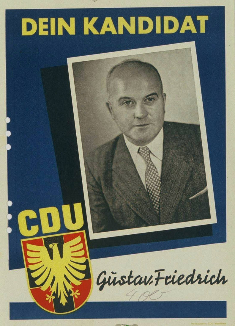 Dein Kandidat Abbildung: Porträtfoto Plakatart: Kandidaten-/Personenplakat mit Porträt Auftraggeber: CDU Westfalen Objekt-Signatur: 10-001: 737 Bestand: Plakate zu Bundestagswahlen (10-001) GliederungBestand10-18: Plakate zu Bundestagswahlen (10-001) » Die 3. Bundestagswahl am 15. September 1957 » CDU » Mit Porträtfoto Lizenz: KAS/ACDP 10-001: 737 CC-BY-SA 3.0 DE